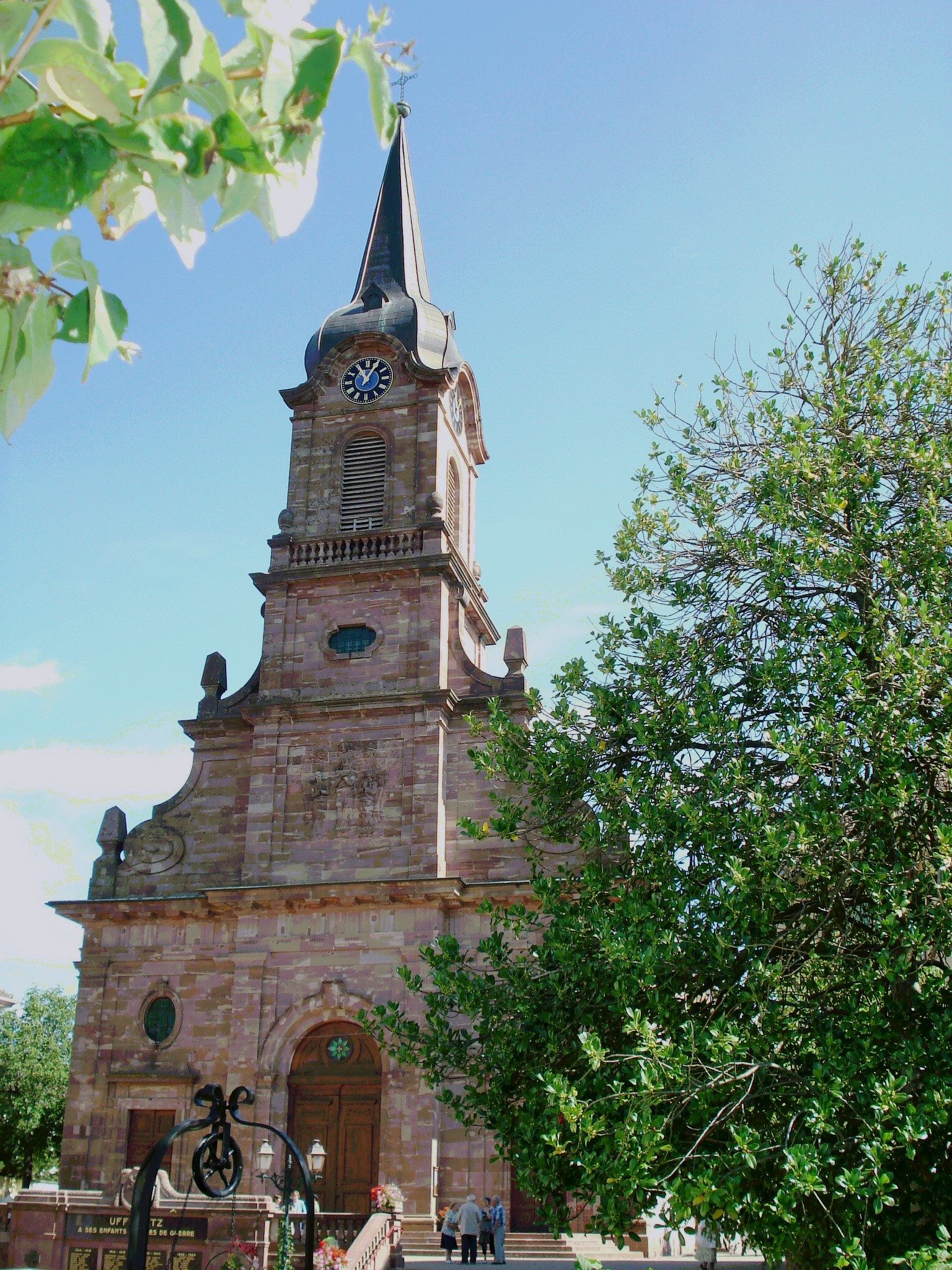 Uffholtz Eglise Façade et clocher